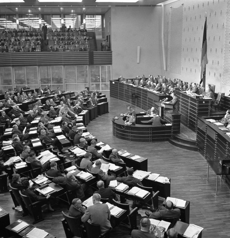 16.12.1954 Erste Lesung der Pariser Verträge im Deutschen Bundestag